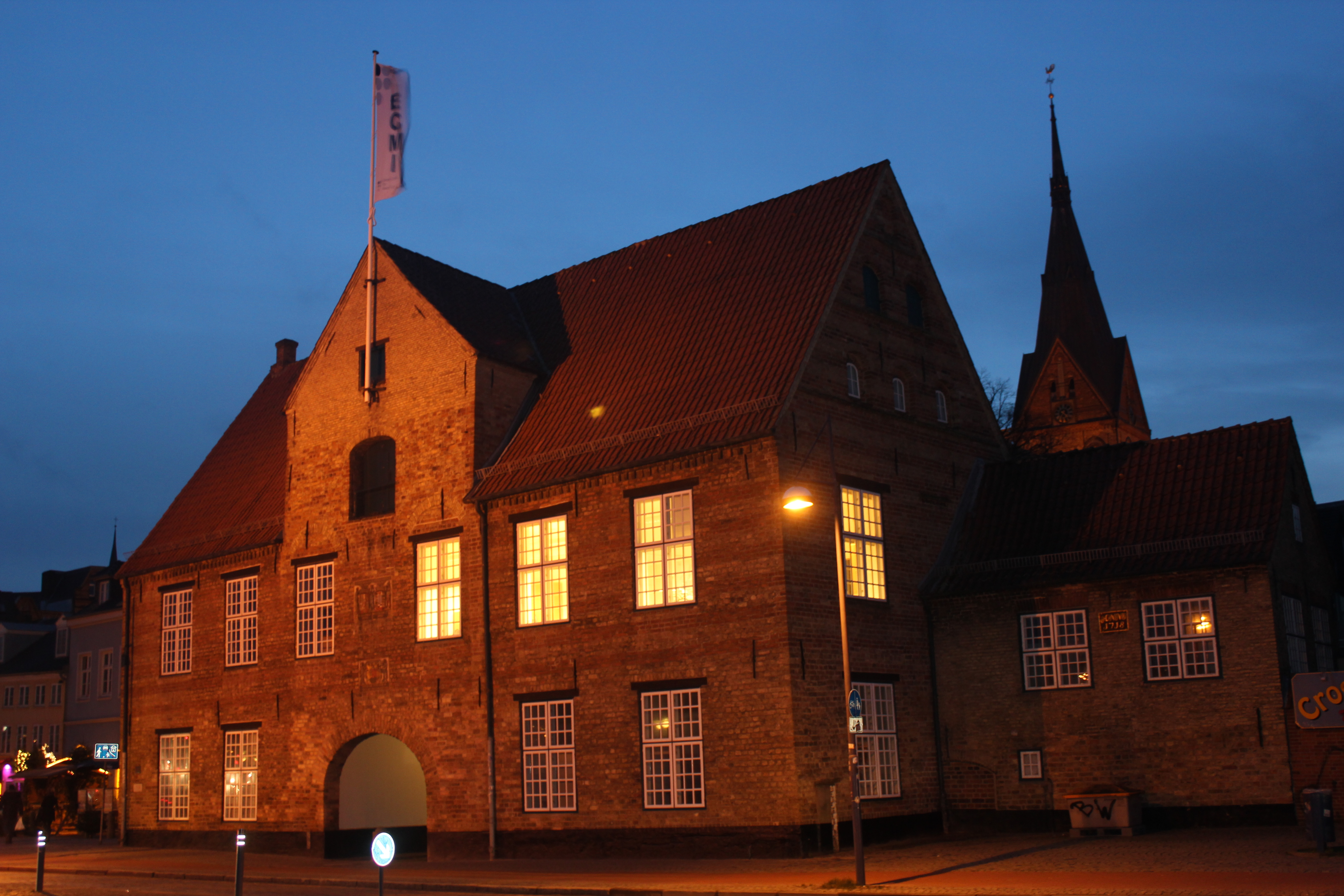 Kompagnietor zur Nacht (Flensburg 2013); links im Bild ist ein weihnachtliches Rentier zu sehen